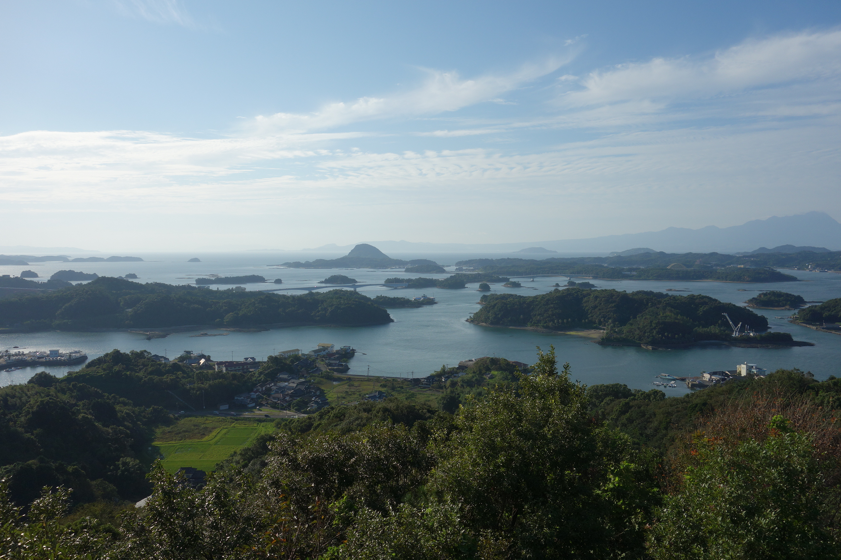 天草松島 20150919